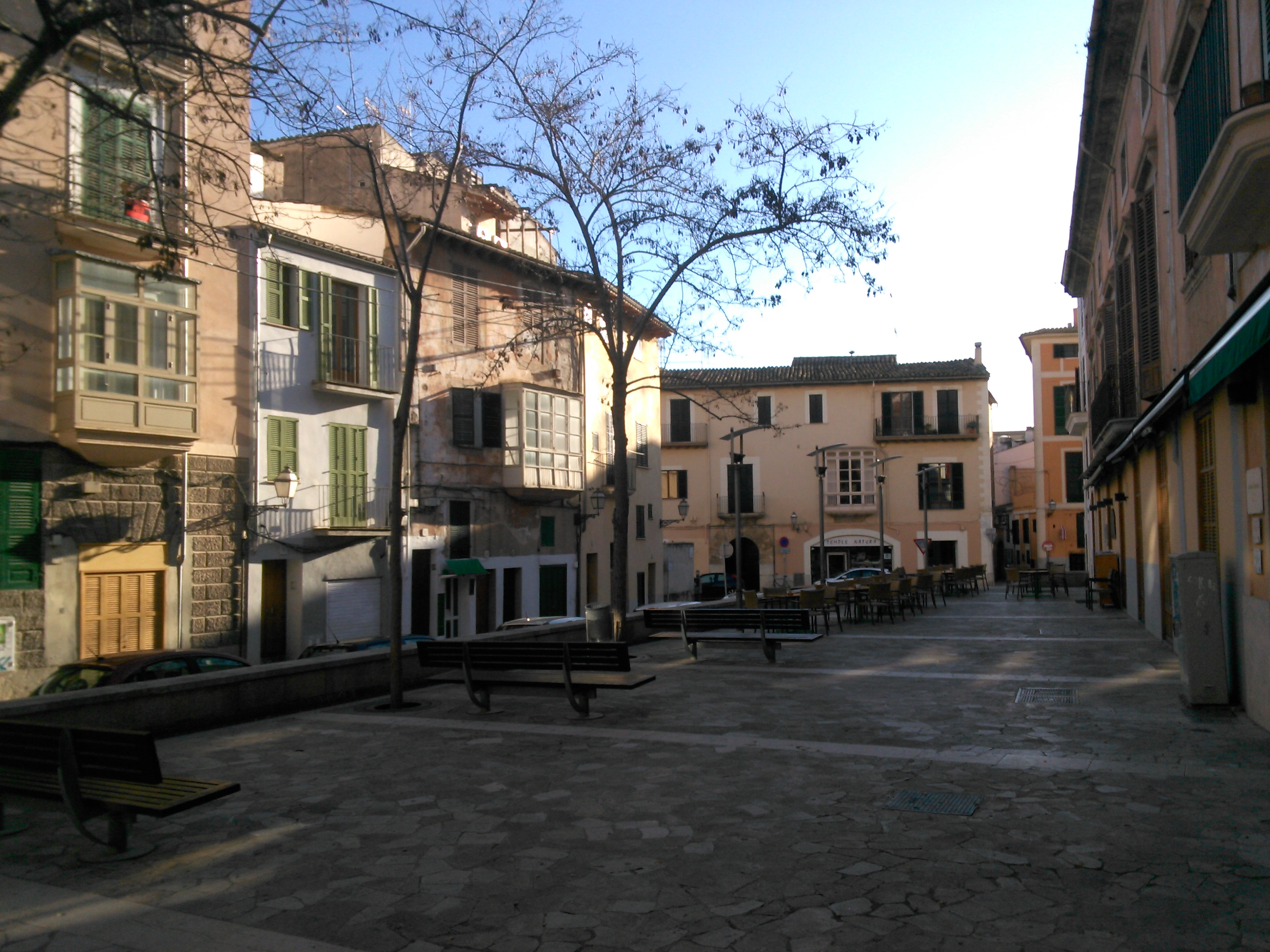 Plaça del pes de la palla a Palma (Mallorca)